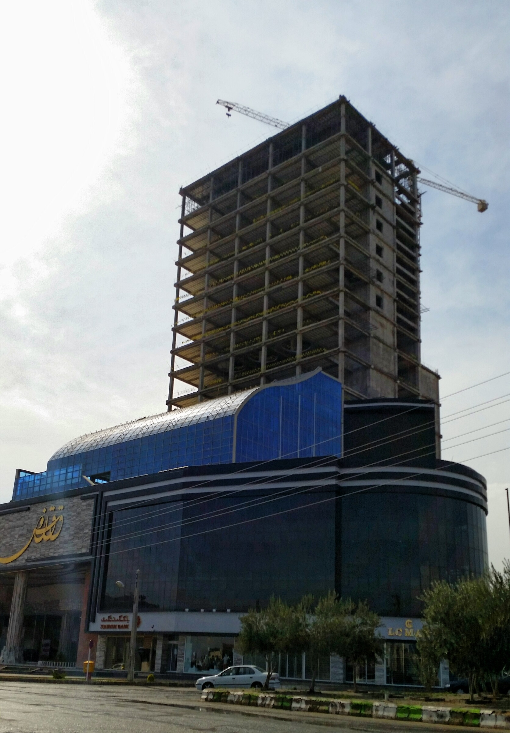 مجتمع تجاری ققنوس سمنان